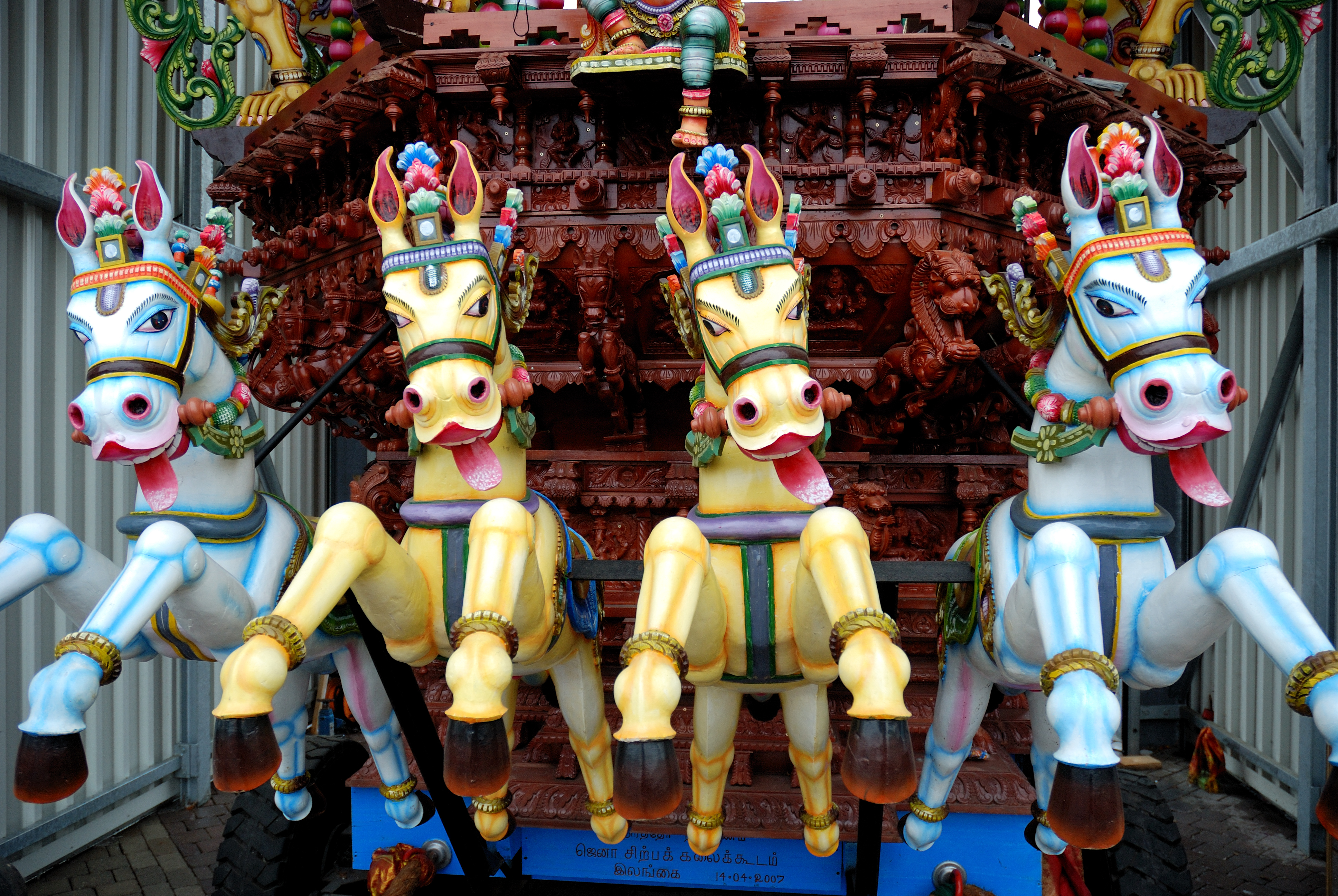 Hindutempel in Hamm Pferde an Wagen für die Prozession